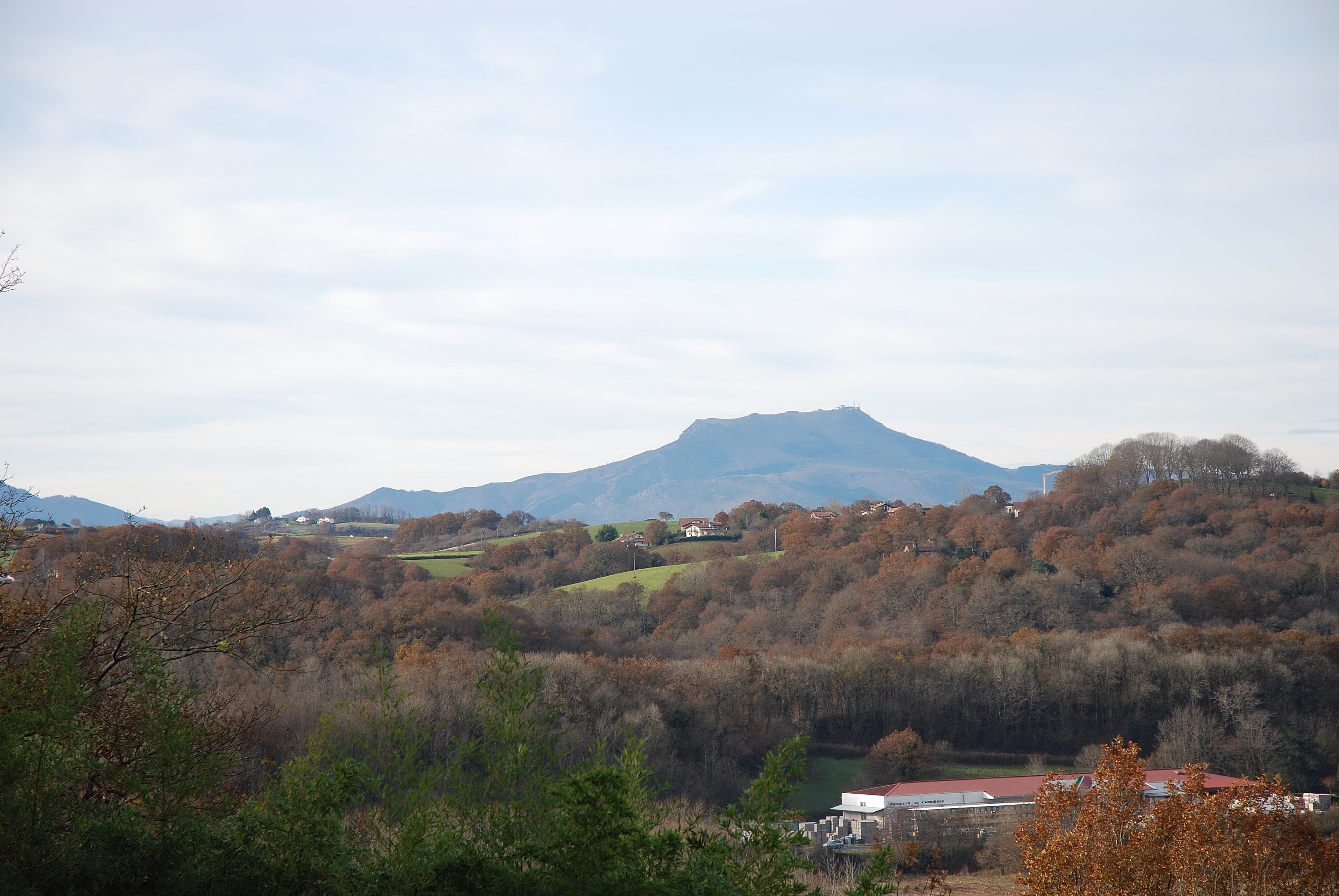 Jatxou, vue sur la Rhune. Photo prise le 31/12/06 par Harrieta171. La Rhune est le premier sommet de la chaîne pyranée,nne. Elle domine de ses 905 mètres la côte basque. Un authentique train à crémaillère de collection datant de 1924 peut vous emmener en 35 minutes, à une vitesse de 9 kms/h, au sommet.